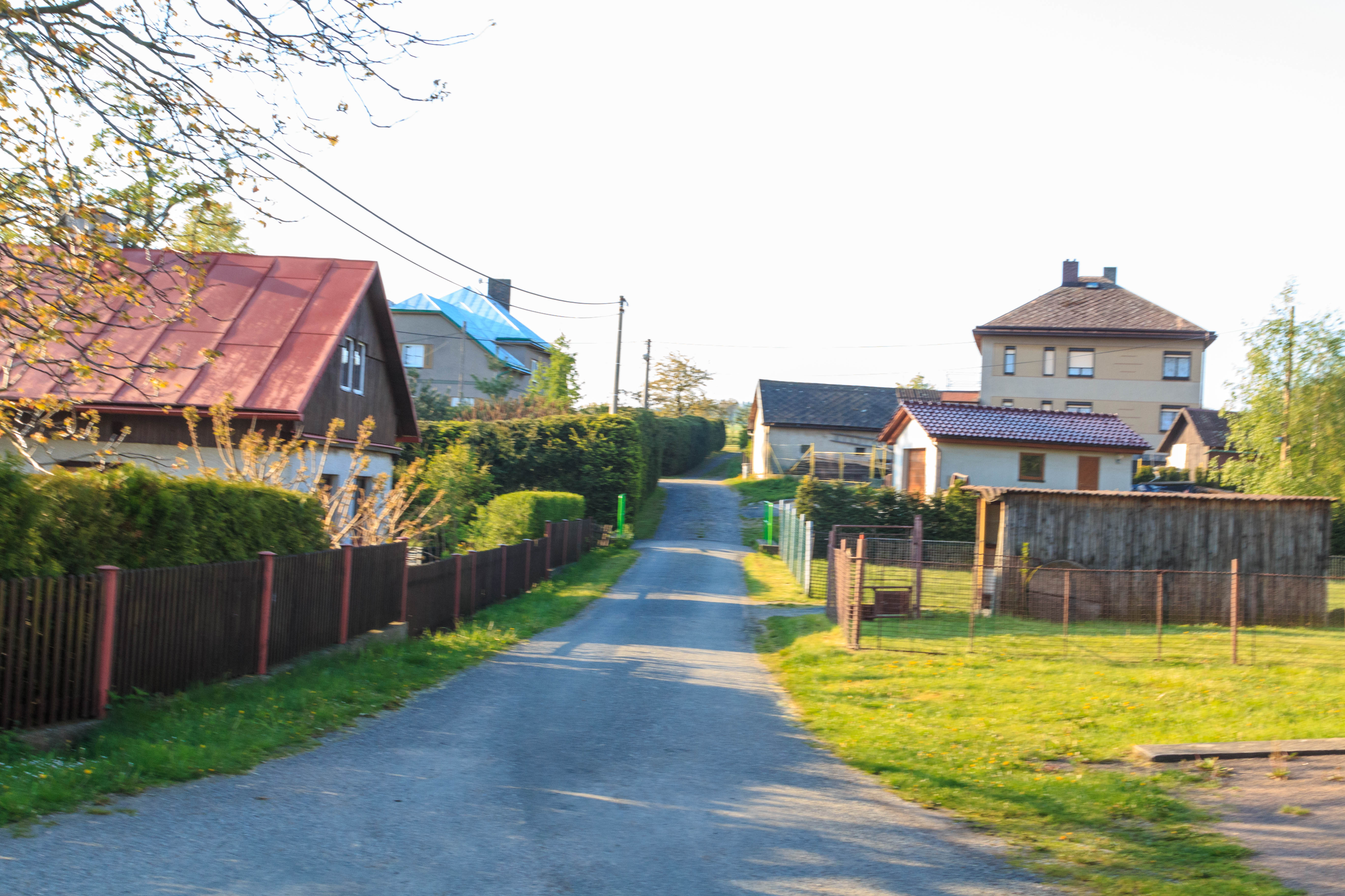 Oldřiš čp. 46